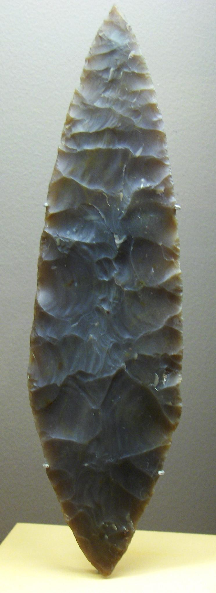 Biface en forme de feuille de laurier